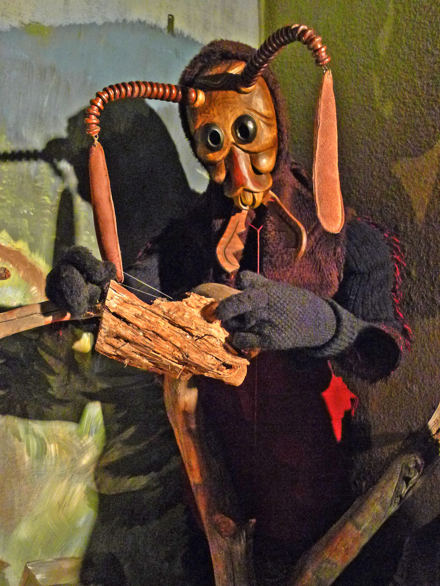 Umbeise-Häs der Narrenzunft Ohlsbach - hier in der Oberrheinischen Narrenschau Kenzingen ausgestellt